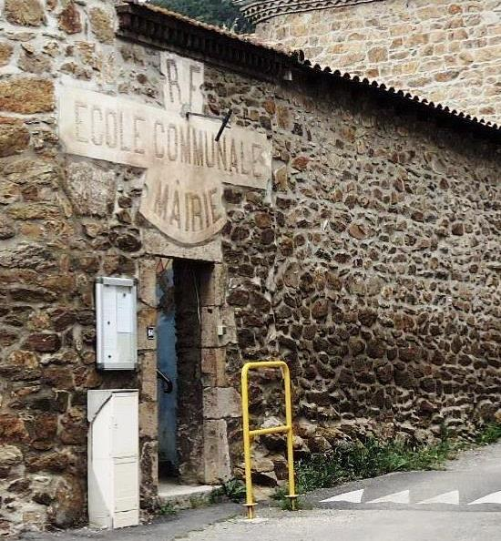 Brossainc détail